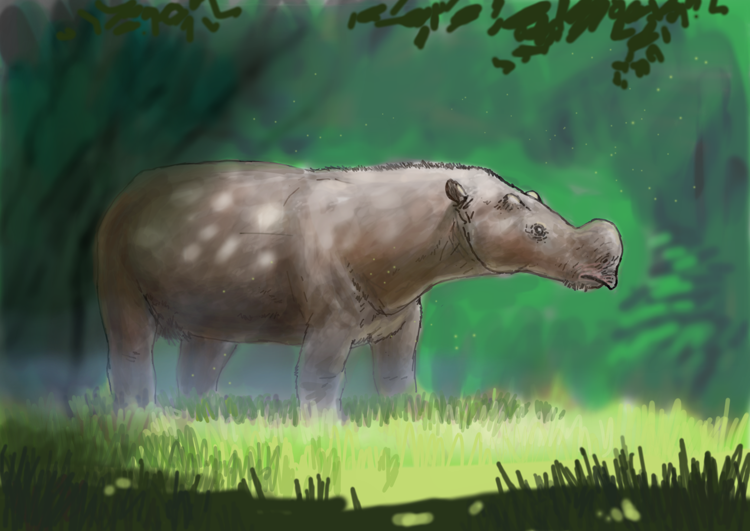 Gobiatherium restoration